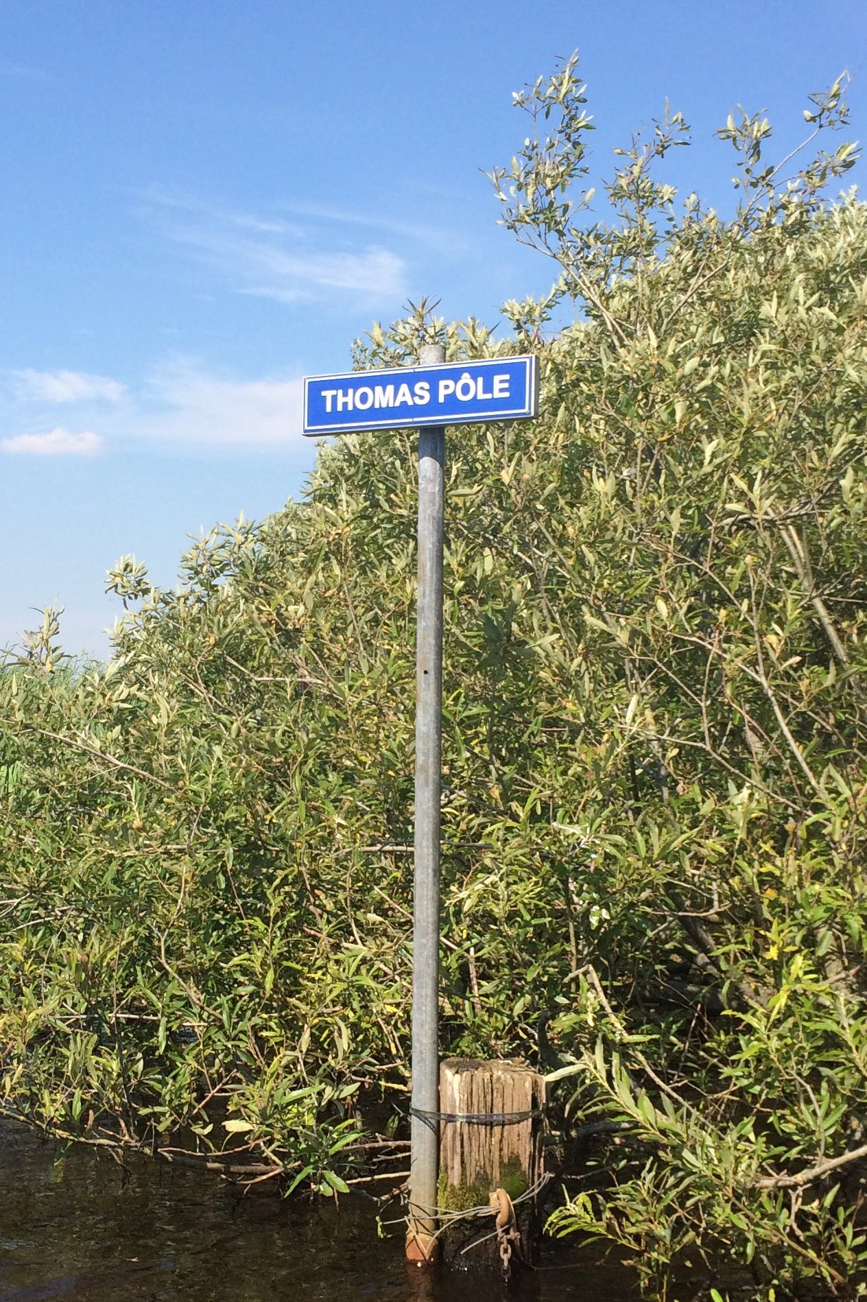 Nijdjip bij Nijbeets naamaanduiding